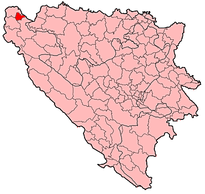 Općina Bužim u Bosni i Hercegovini